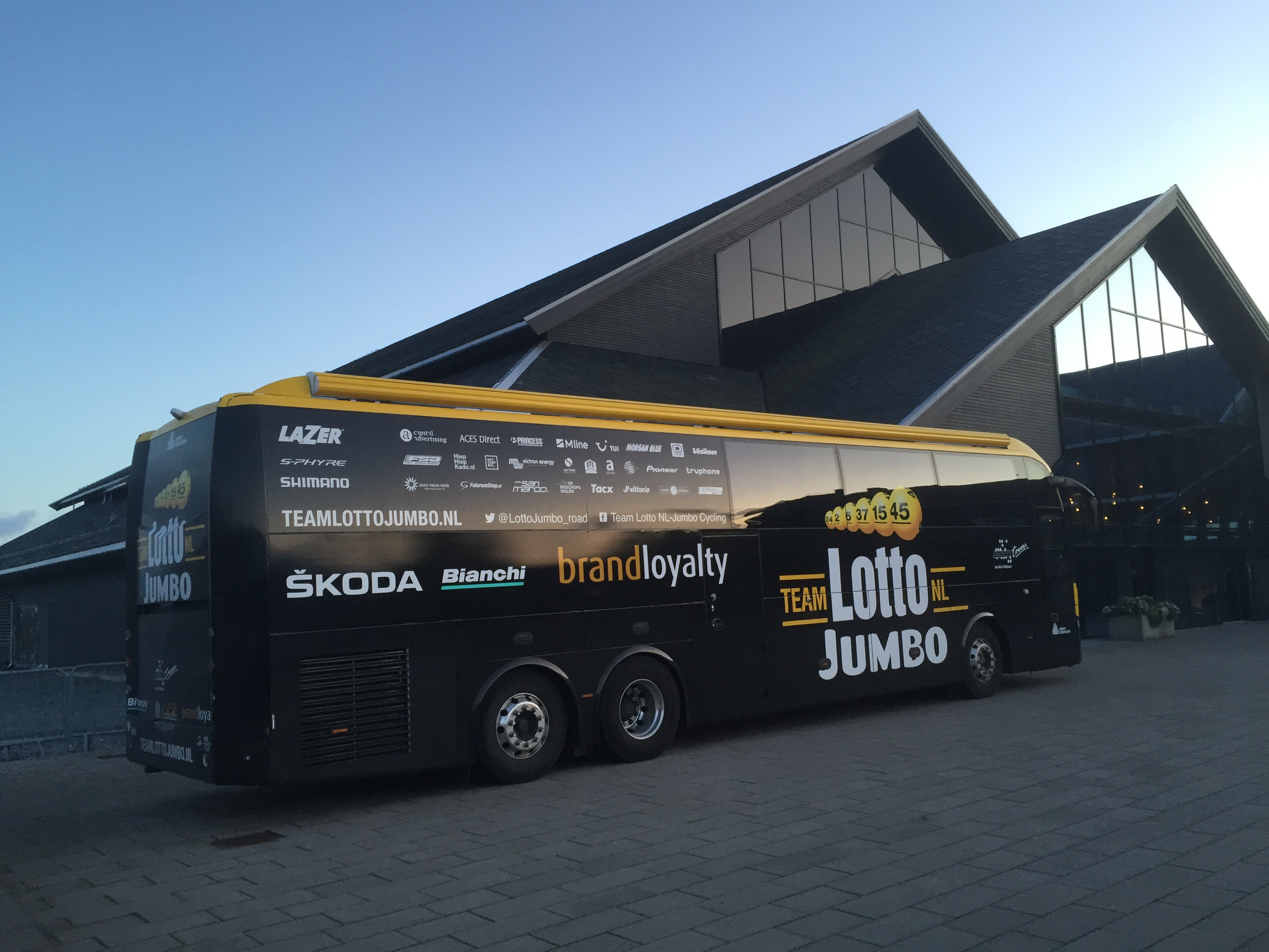 Lagbussen til et profesjonelle sykkellaget Lotto Jumbo fotografert ved Panorama Hotell & Resort under Sykkel-VM 2017